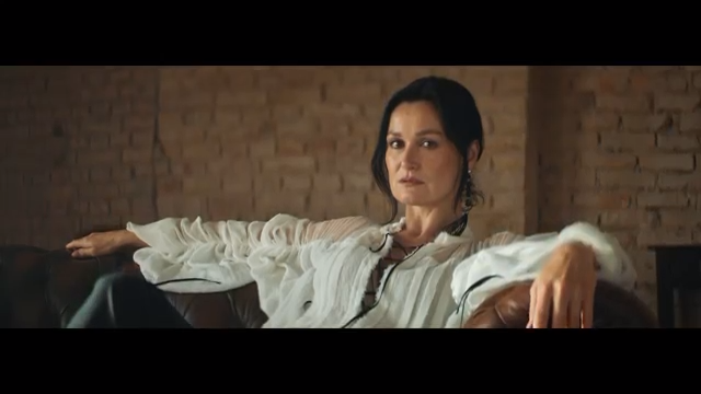 Знімок з відео на пісню "Перша Леді", виконавці - Pianoбой і Аліна Паш.